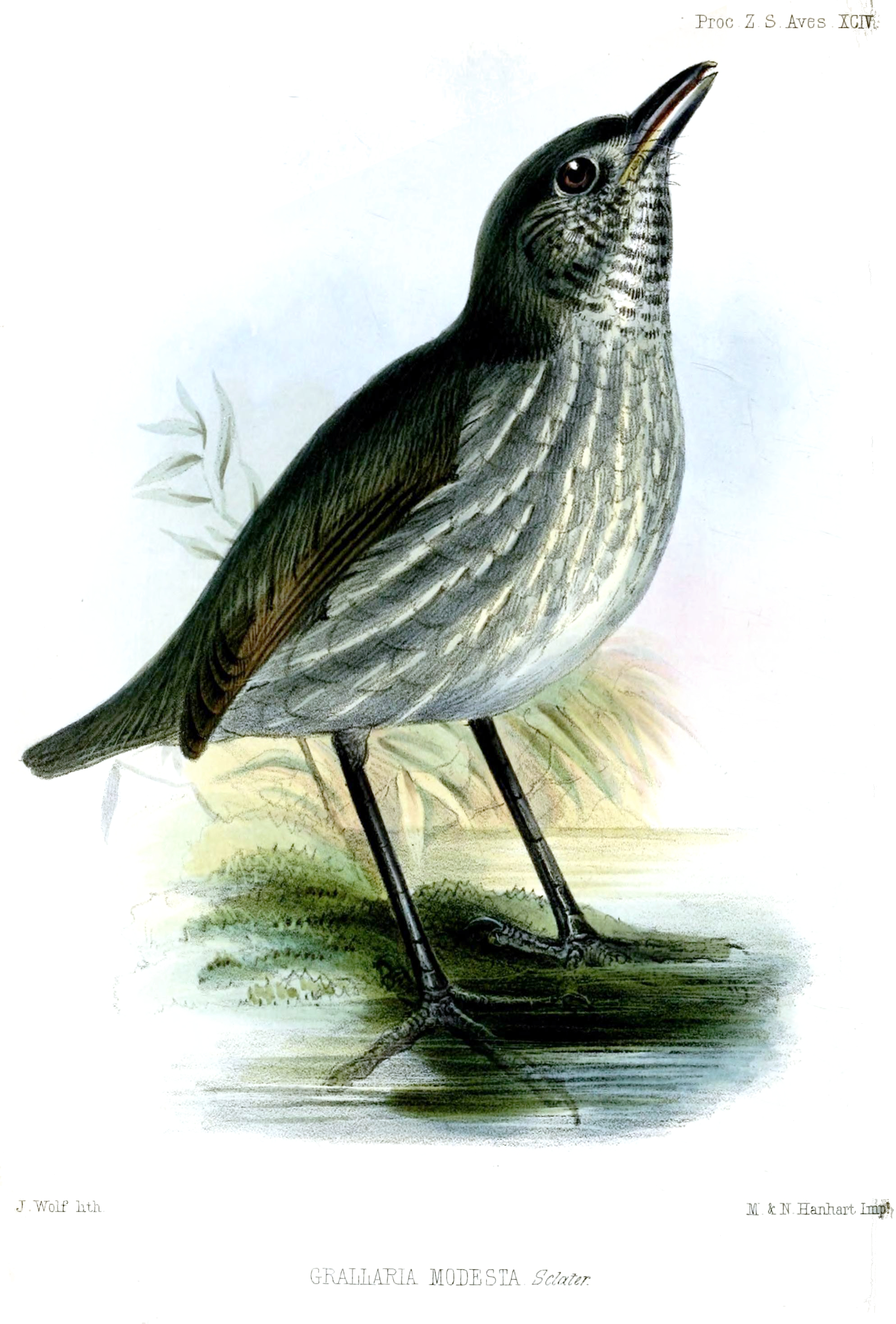 Grallaria modesta=Myrmothera campanisona modesta